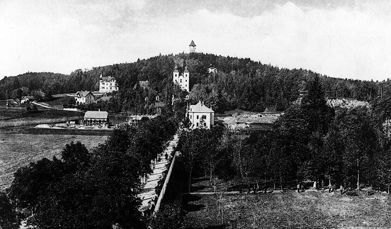 Kreuzbergl bei Klagenfurt um 1890 - view on the Kreuzbergl in Klagenfurt (1890) 21:38, 9. Jan 2006 Eixi 800 x 470 (174134 Byte) (* Bildbeschreibung: Kreuzbergl bei Klagenfurt um 1890 * Quelle: Scan von ~~~~)